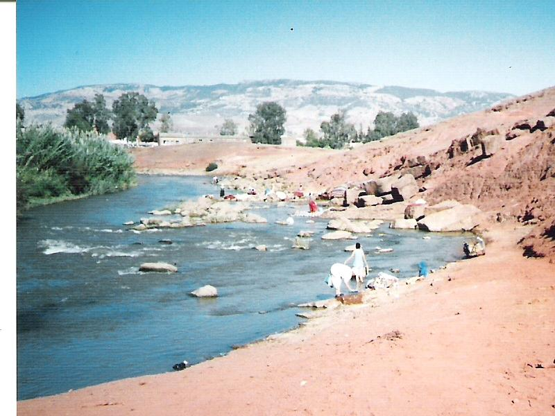 license: GFDL photo personnelle de Hadraj prise de vue à Khénifra